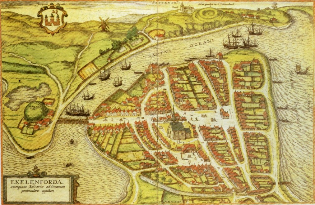 Eckernförde erster bekannter Stadtplan, eigener Scan aus Buchabbildung